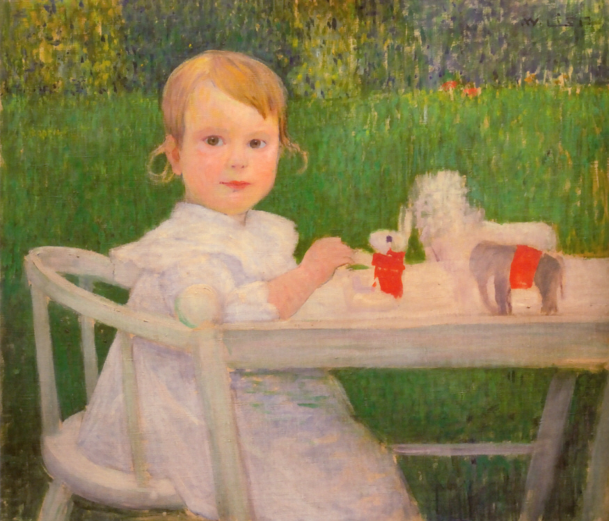 Kinderbildnis